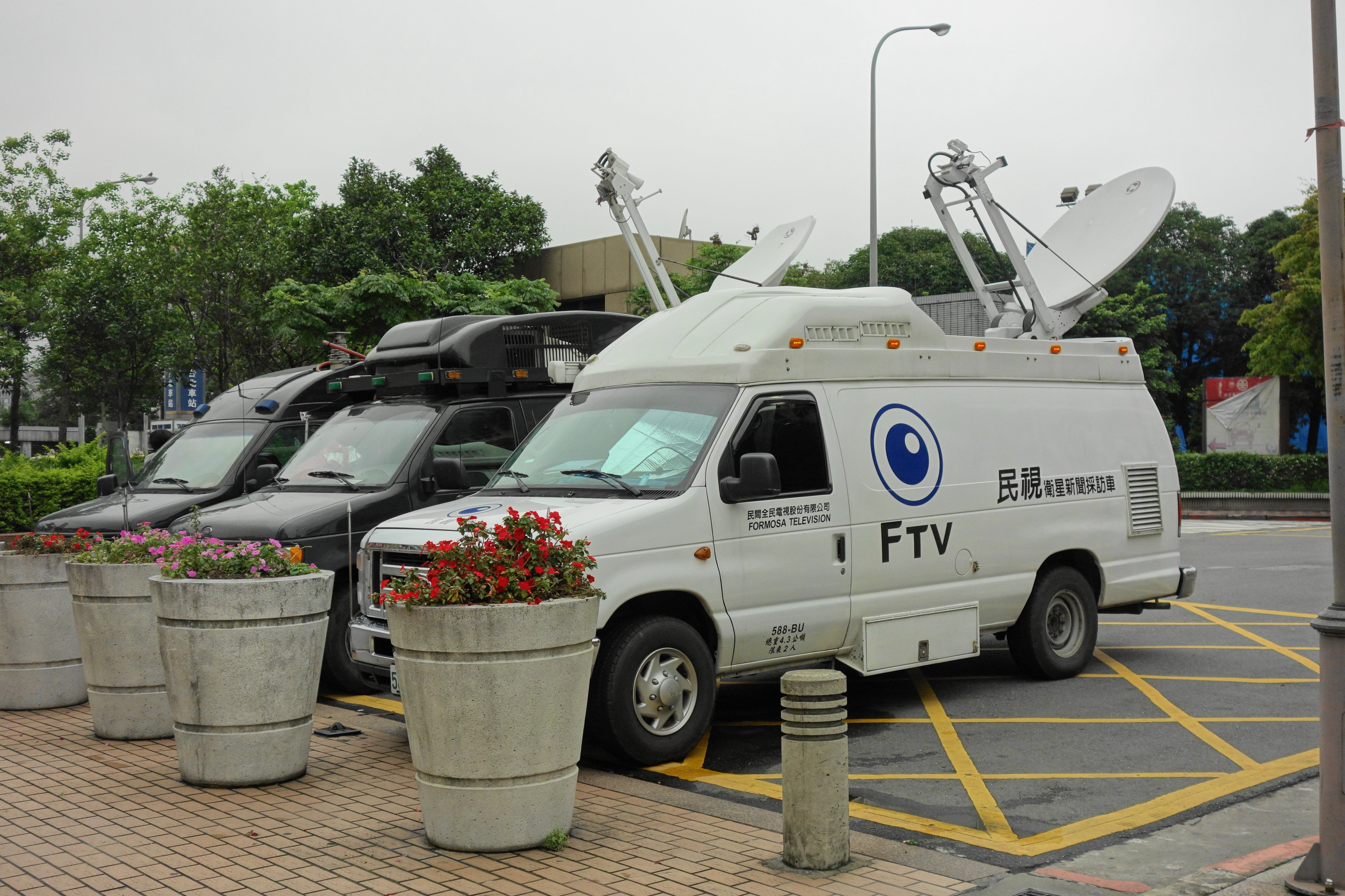 民視新聞（FTV News）のSNG中継車（衛星新聞採訪車）588-BU （台北駅前（台湾・台北市中正区）、2013年4月）